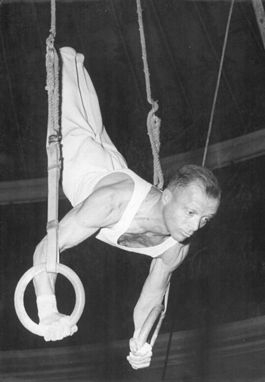 Alfred Müller Zentralbild Weiß 20.10.1952 Zum 100. Todestag von Friedrich Ludwig Jahn wurde zum Abschluss der Jahnwoche am 19. Oktober 1952 in der Deutschen Sporthalle in der Stalinallee, Berlin, eine grosse Sport- und Kulturveranstaltung durchgeführt. UBz: Der DDR Meister im Zwölf-Kampf und am Barren 1952, Alfred Müller, turnt an schwingenden Ringen.